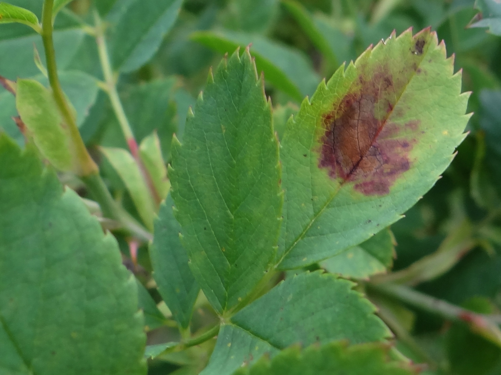 Peronospora sparsa on Rosa canina